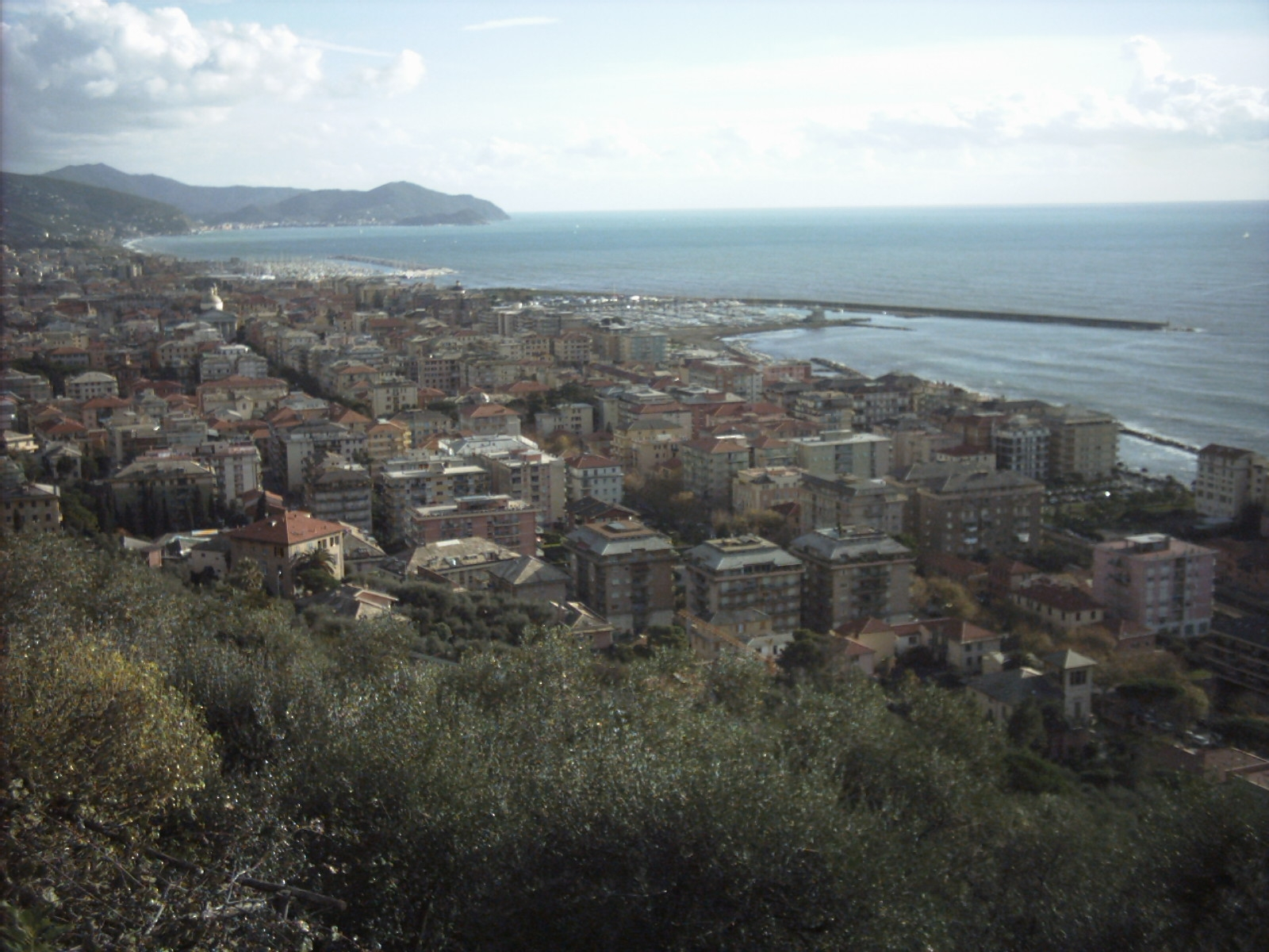 Panorama di Chiavari